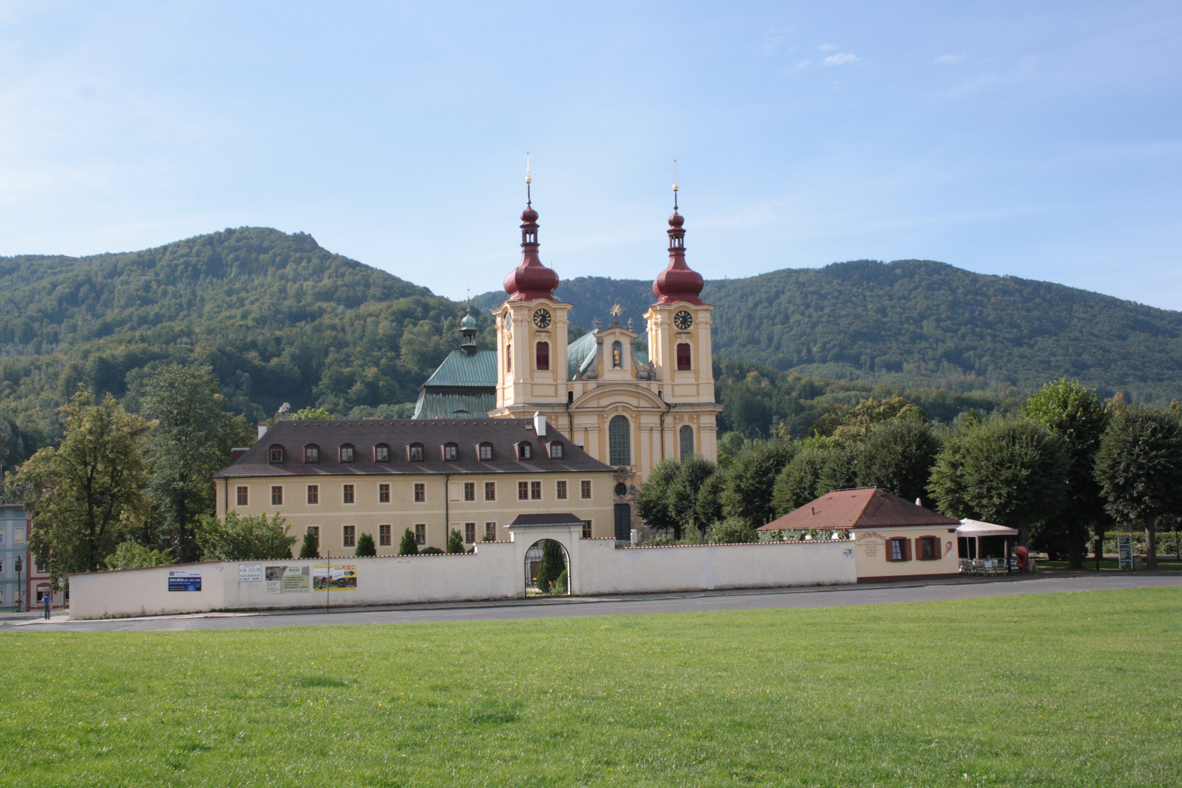 This photograph was taken with a DSLR from WMCZ's Camera grant. Celkový pohled na klášetr s bazlikou v Hejnicích v okrese Liberec.